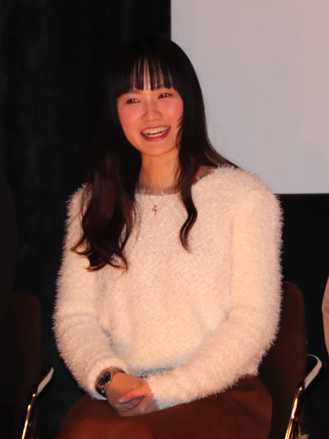 横浜光音座「強がりカポナータ」舞台あいさつ（2020年1月）秋乃ゆに